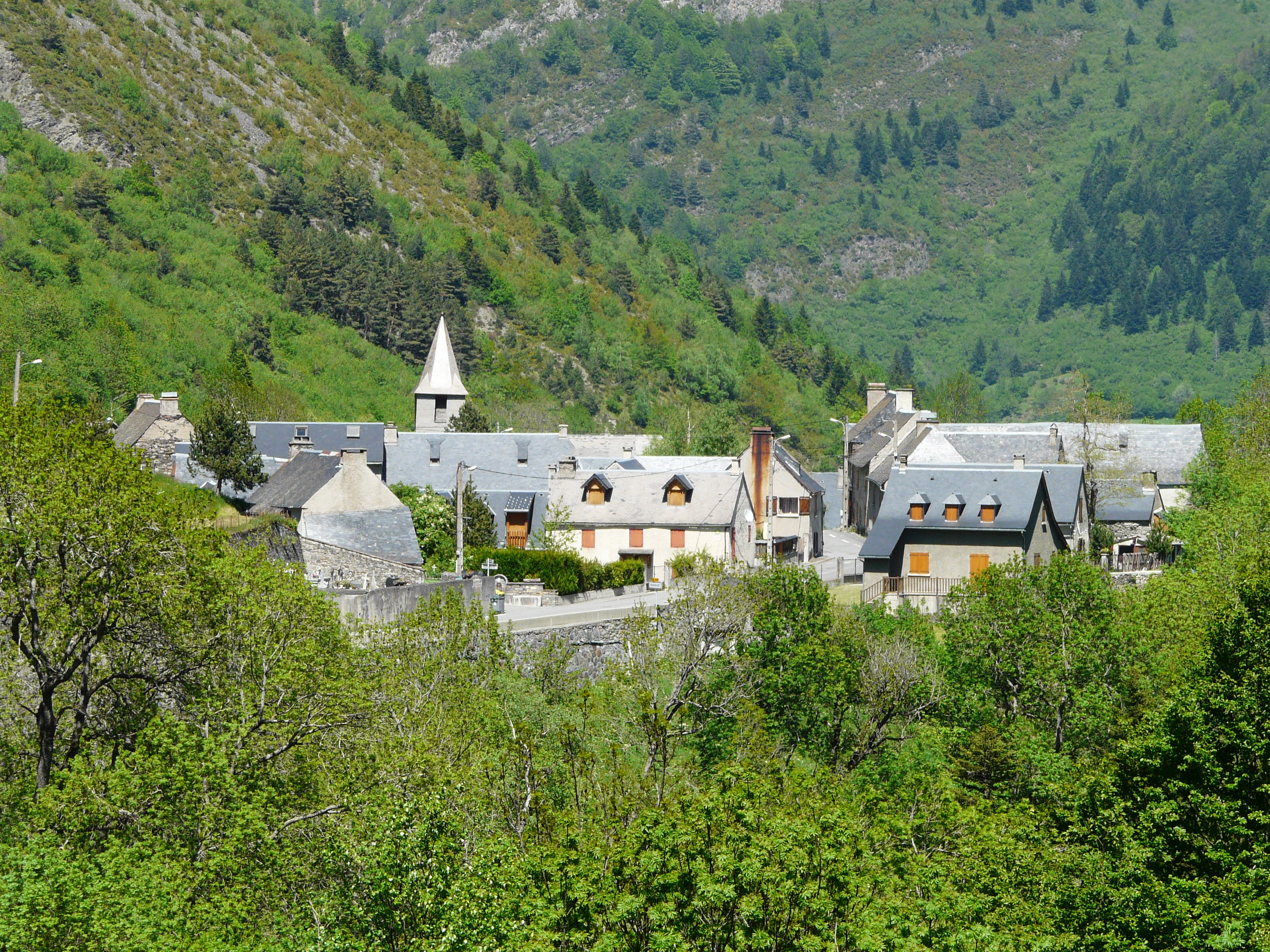 Le village d'Aragnouet vu du sud-ouest, Hautes-Pyrénées, France.